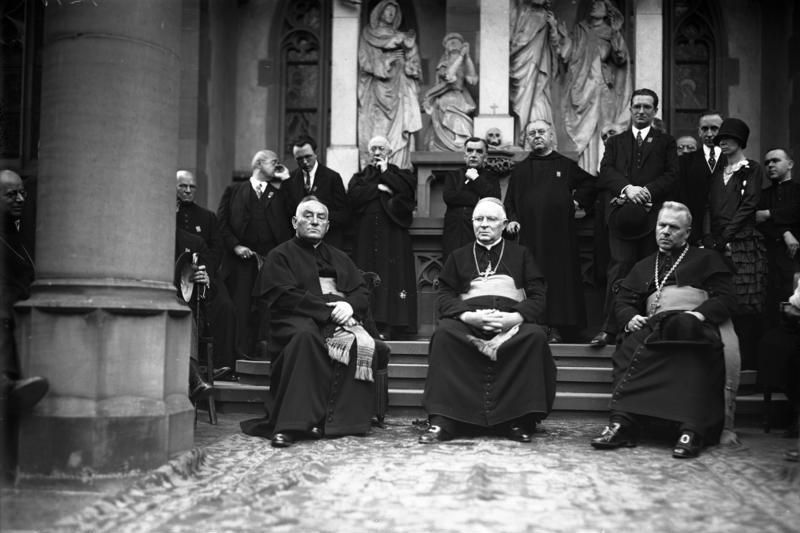 Hildegradesfest am Mittel-Rhein ! Anlässlich des 750. Todestages der heiligen Hildegard von Bingen, fand unter Teilnahme von Prälat Dr. Seipel, Reichskanzler a.D. Dr. Wirth und anderen hohen kirchlichen Würdenträger eine feierliche Prozession in Bingen a/Rhein statt.